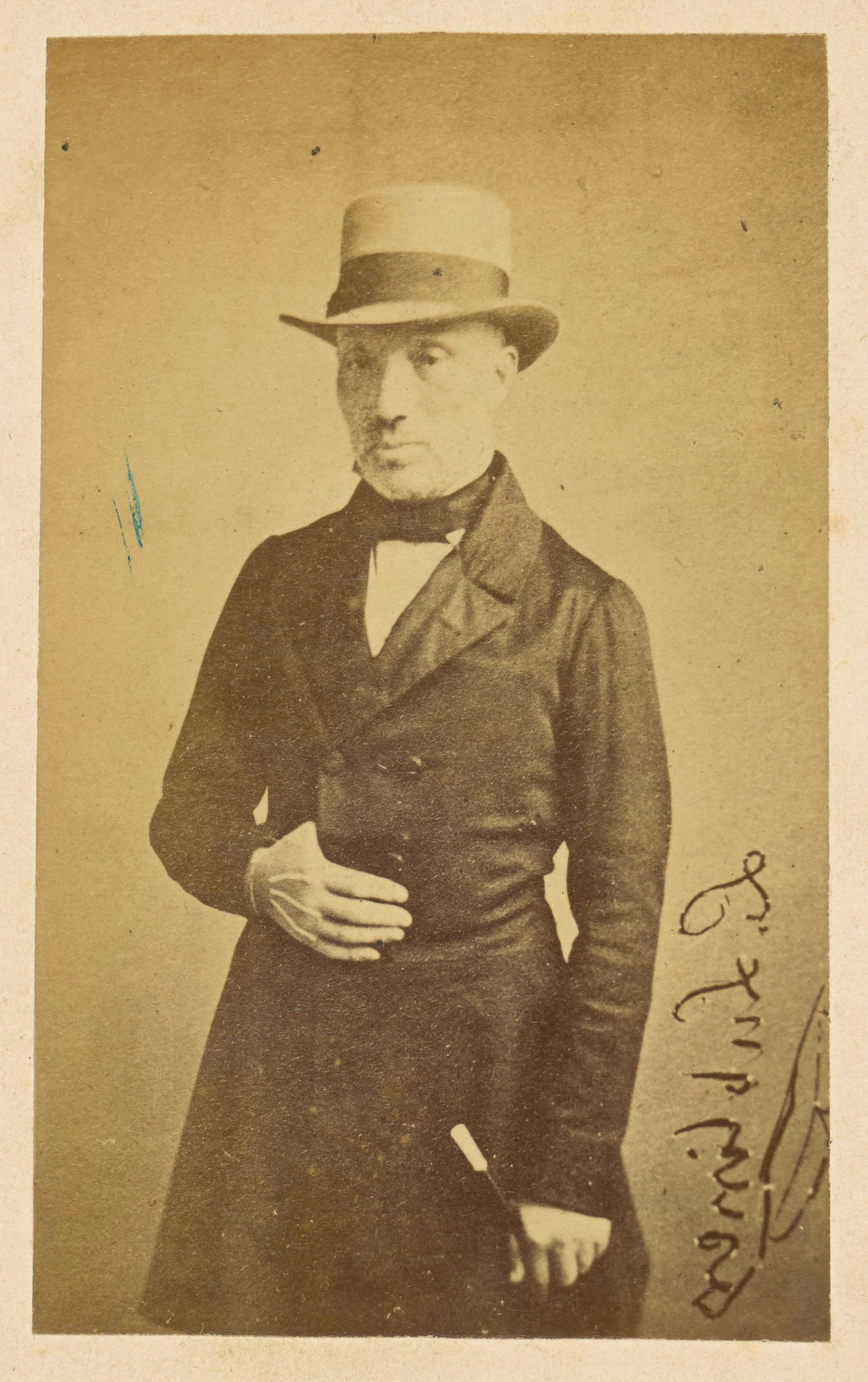 Ludwik Ozjasz Lubliner